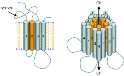 Esquema do receptor GABAA